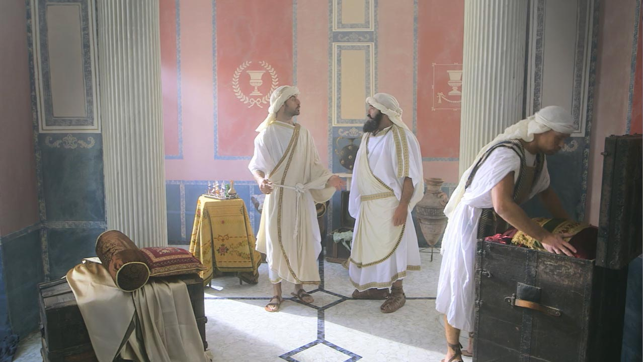 מרכז שרשרת הדורות